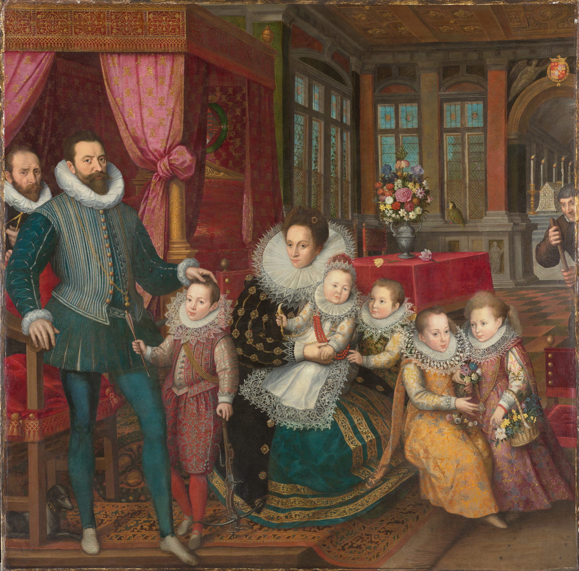 Charles d'Arenberg and Anne de Croy with their family. Karel, 2de prins van Arenberg, met zijn familie Portrait de familie de Charles d’Arenberg et Anne de Croy, avec cinq de leurs douze enfants. Le prince-comte pose la main sur la tete de Philippe, son fils aine. Anne de Croy tient sur ses genoux Antoine, qui entrera en religion sous le nom de Charles de Bruxelles. Le tableau est attribute au peintre et cartographe Francois Pourbus, qui serait represente derriere Charles d’Arenberg, tenant un compass dans la main. K.U. Leuven, Arenbergverzameling hoogte: 223 cm breedte: 227 cmDescription: cat. 1976, nr. 69 cat. 1987, nr. 17 Institution place: Leuven Institution: Arenbergkasteel